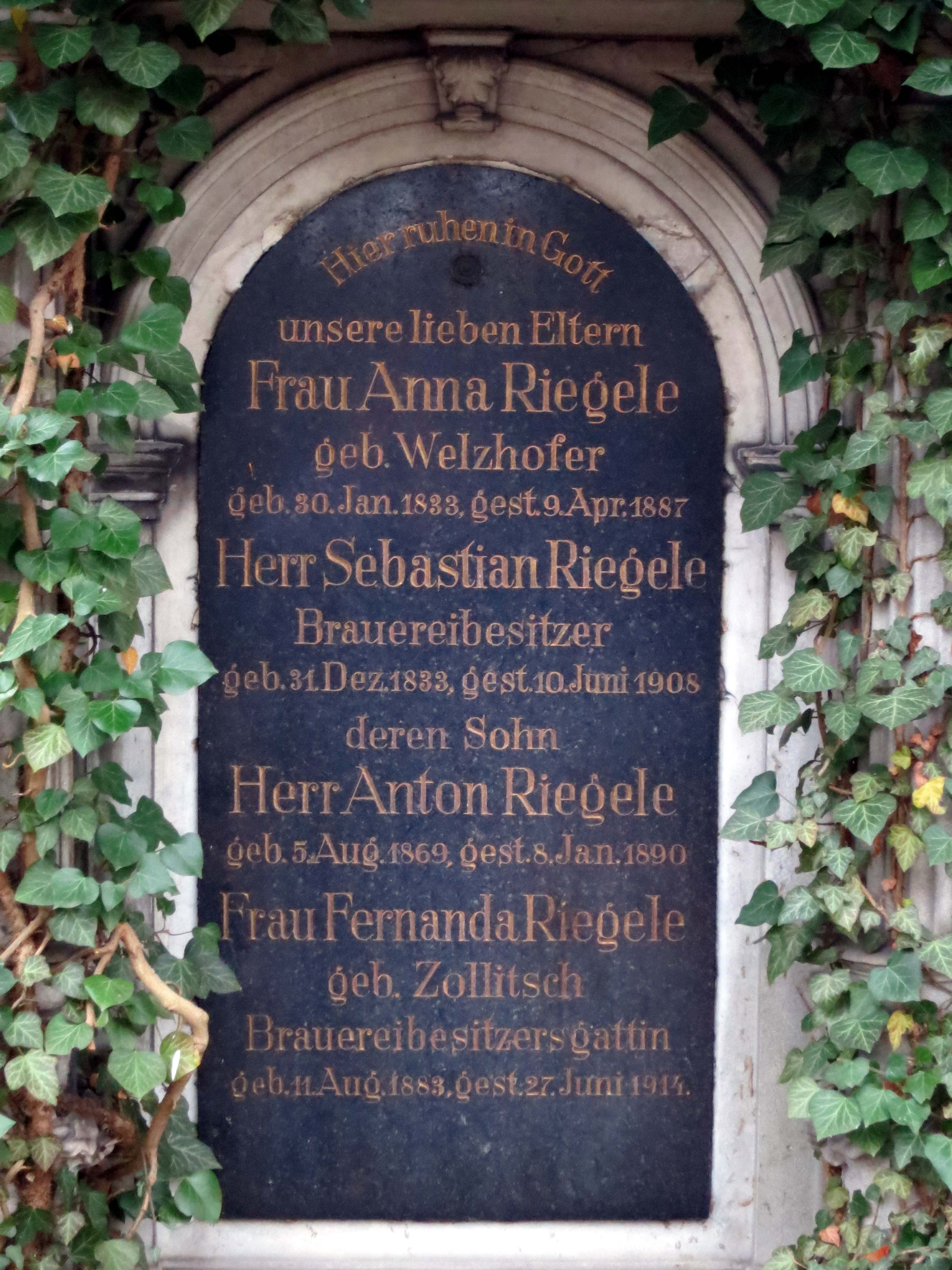 Das Grab der Familie Riegele auf dem Friedhof an der Hermanstraße in Augsburg - Detail Platte